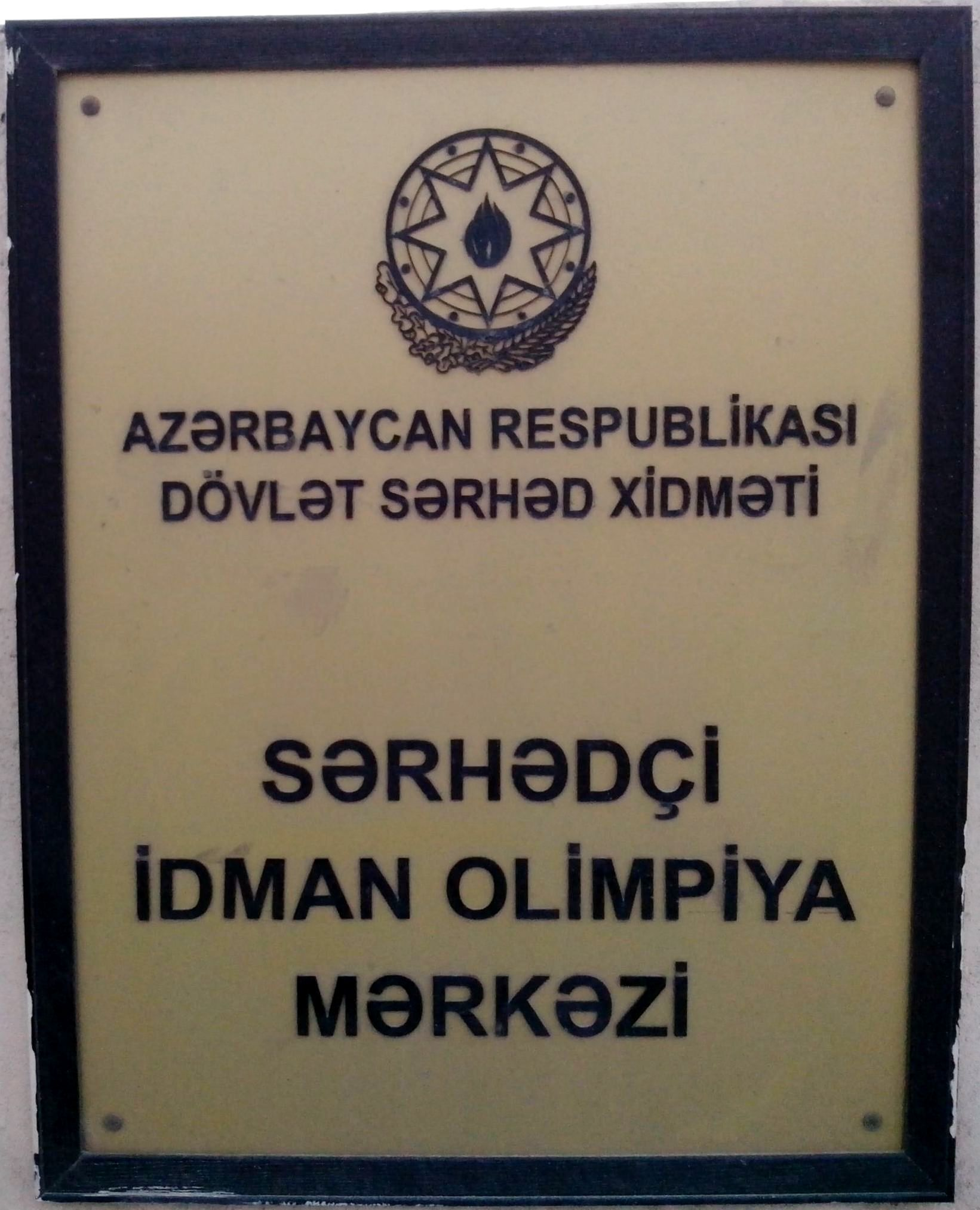 Bakı, Sərhədçi İdman Olimpiya Mərkəzi